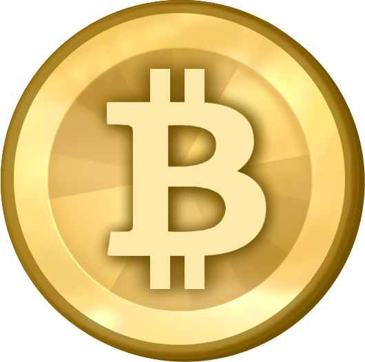 AUSbitcoins Logo